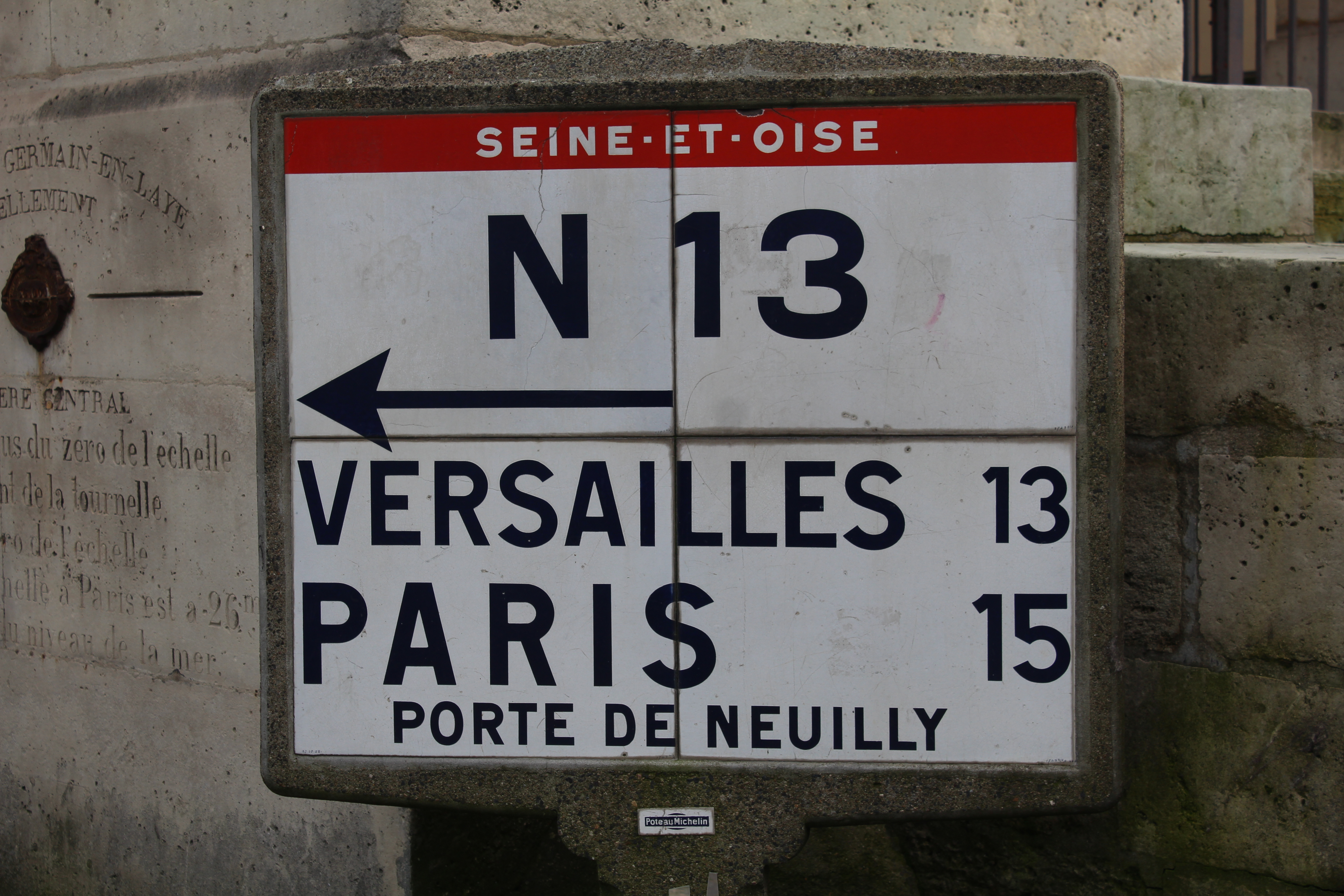 Panneau Michelin le long de l'ancienne route nationale 13 près de l'église Saint-Germain, Saint-Germain-en-Laye.